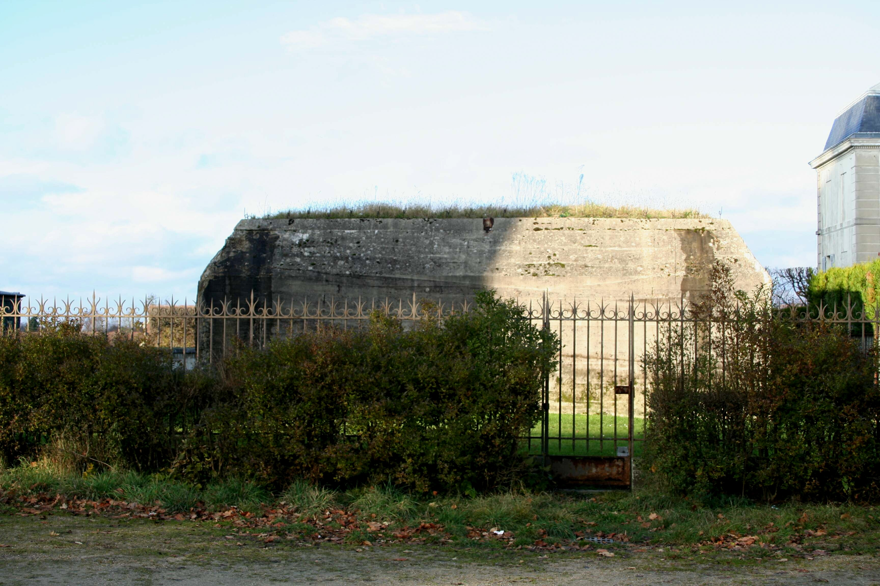 Blockhaus près du château à Saint-Germain-en-Laye - Yvelines (France)